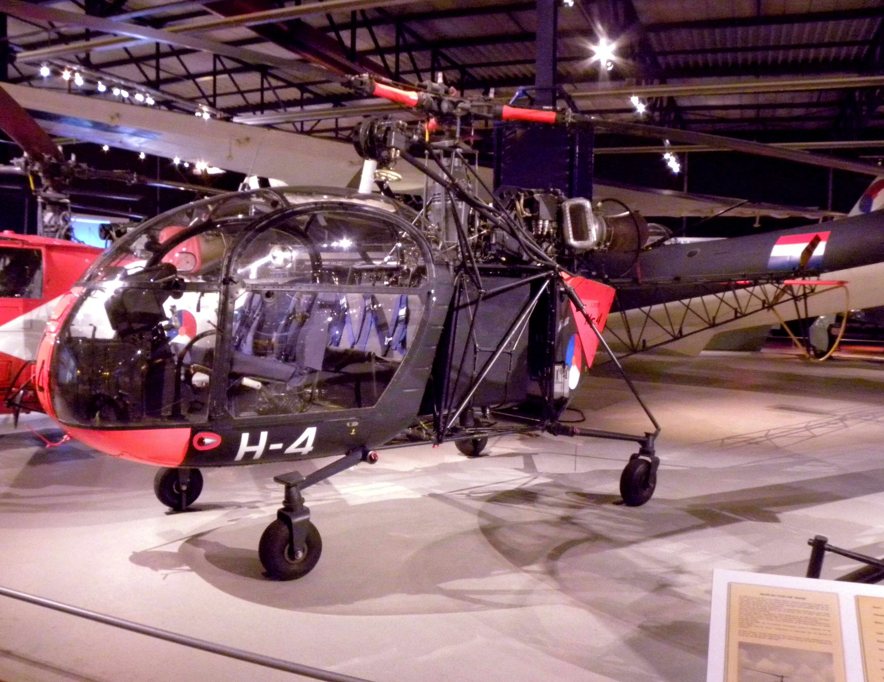 seen at militare luchtvaart museum Soesterberg